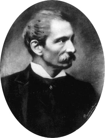 Prime ministers of Italy Giuseppe Zanardelli.